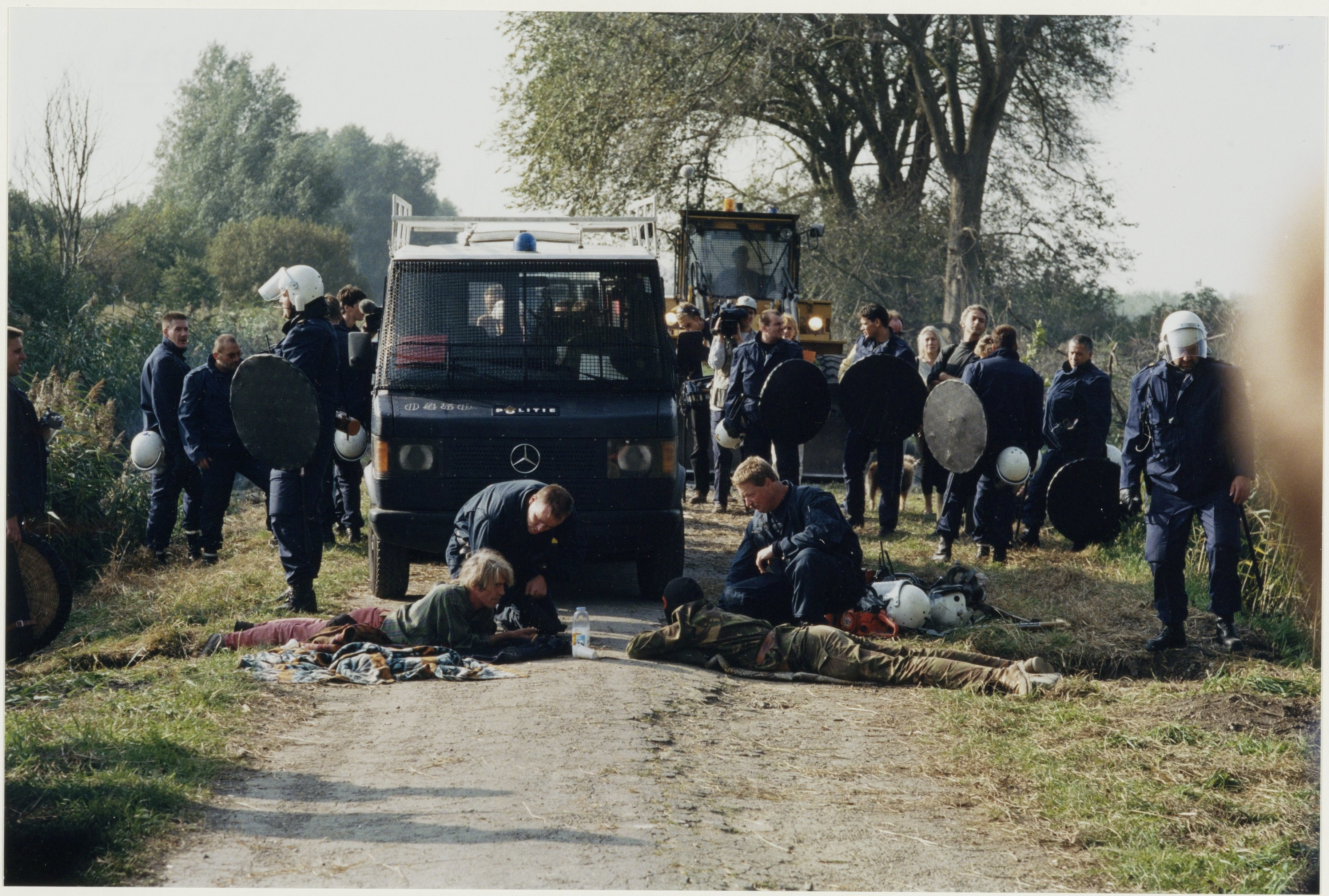 CollectieCollectie Fotoburo de BoerInventarisnummerNL-HlmNHA_54037155NL-HlmNHA_1478_44773kBeschrijvingActievoerders, met een arm vergrendeld in het wegdek, blokkeren de oprukkende Mobiele Eenheid tijdens de ontruiming van Ruigoord.FotonummerNL-HlmNHA_1478_6063DocumenttypeHistorieprenten, tekeningen en foto'sVervaardigerEngelchor, Jur (UP de Boer) Soort vervaardigerFotograaf AnnotatiesHD 071097LandNederland ProvincieNoord-Holland GemeenteAmsterdam PlaatsRuigoord GeografischHoutrakpolder Begindatum10-1997Einddatum10-1997TechniekFoto Trefwoordendemonstraties, politie